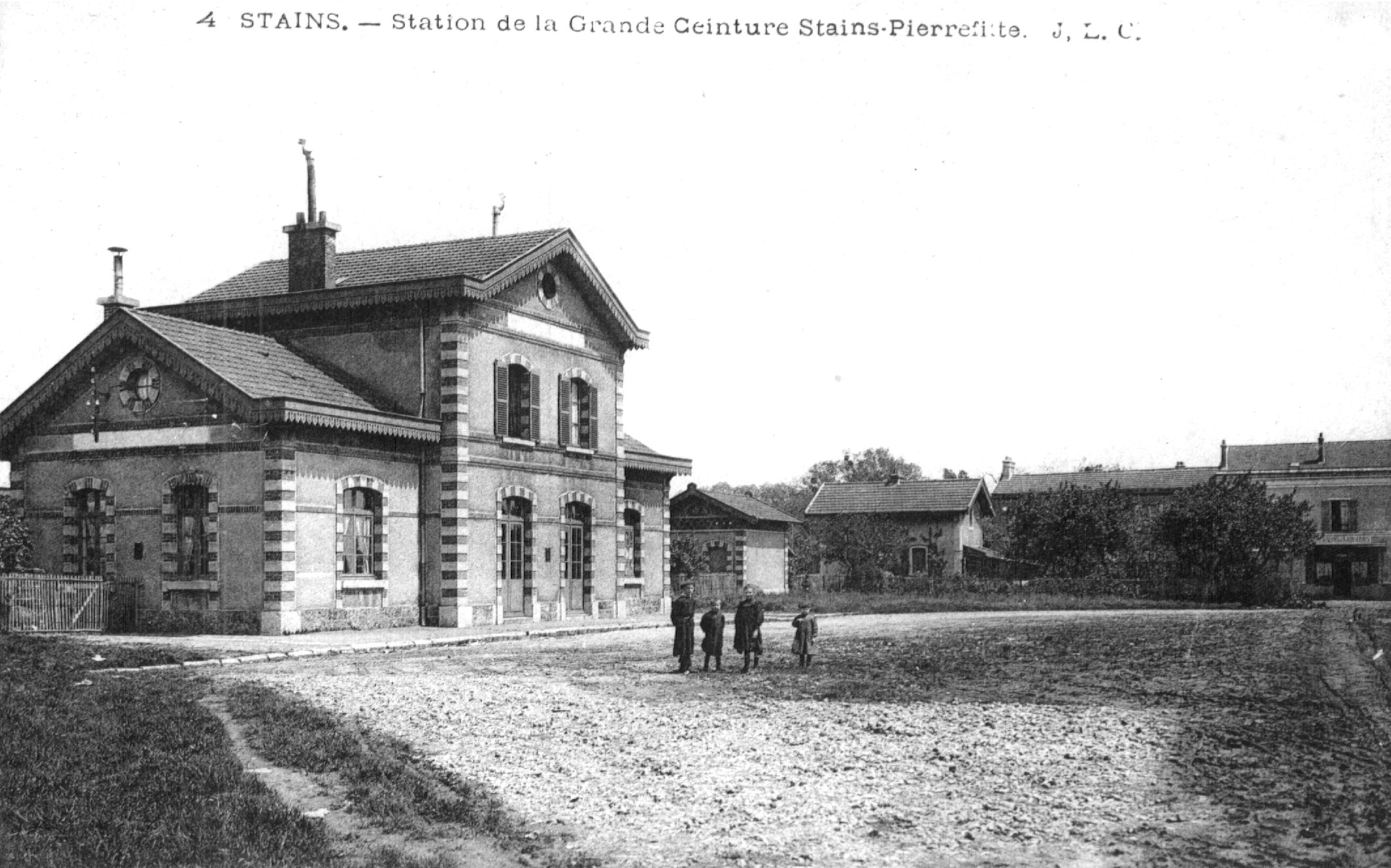 Carte postale ancienne éditée par JLC (N°4) STAINS - Station de la Grande Ceinture Stains-Pierrefitte